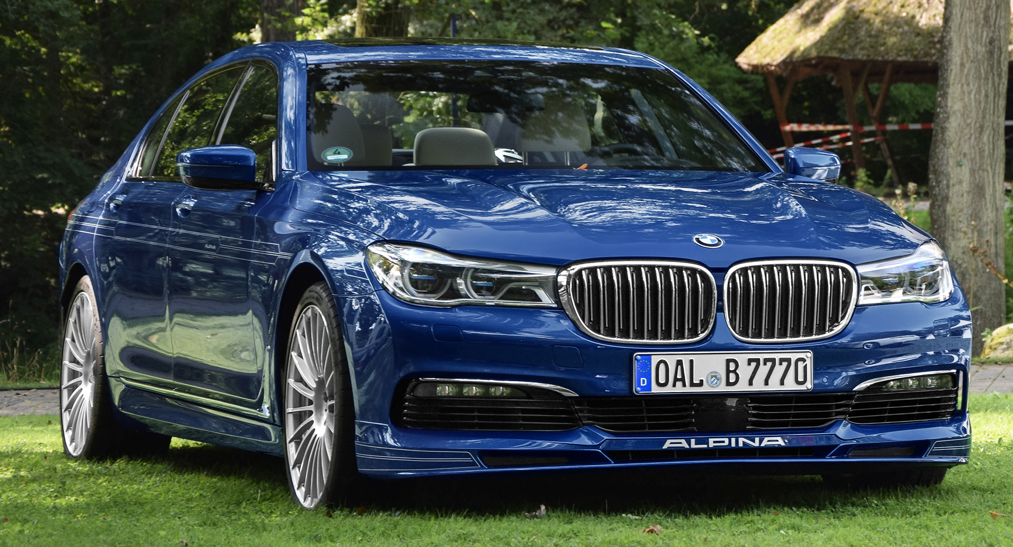 BMW Alpina B7 Biturbo G11